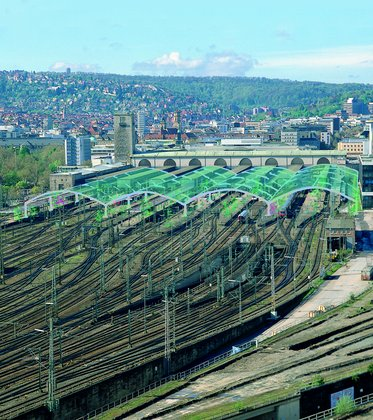 Stuttgart Hauptbahnhof, Fotomontage für das Projekt Kopfbahnhof 21